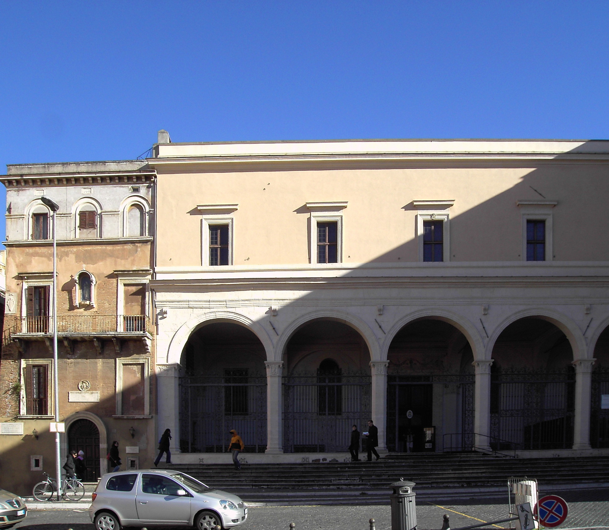 Roma, san Pietro in Vincoli, facciata.